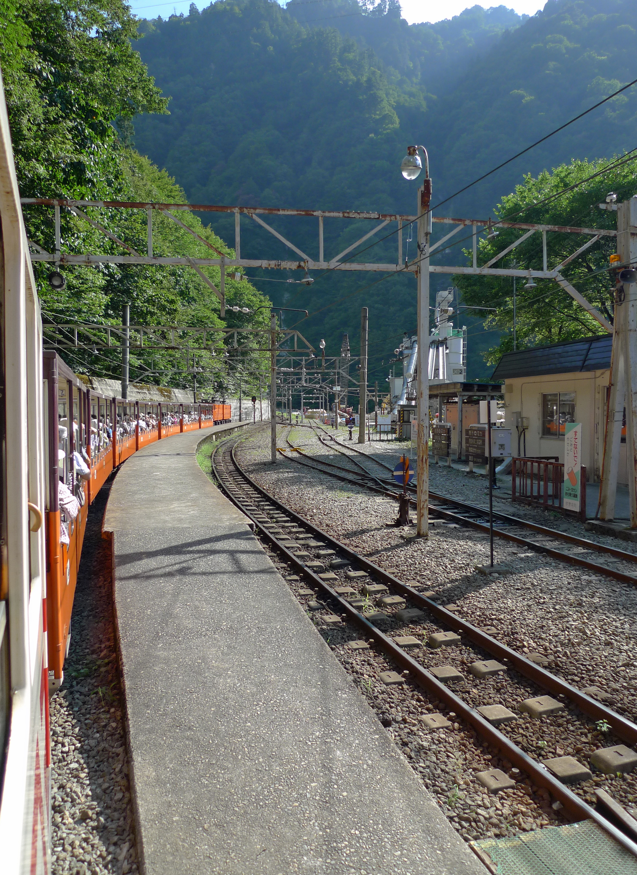 黒部峡谷鉄道猫又駅